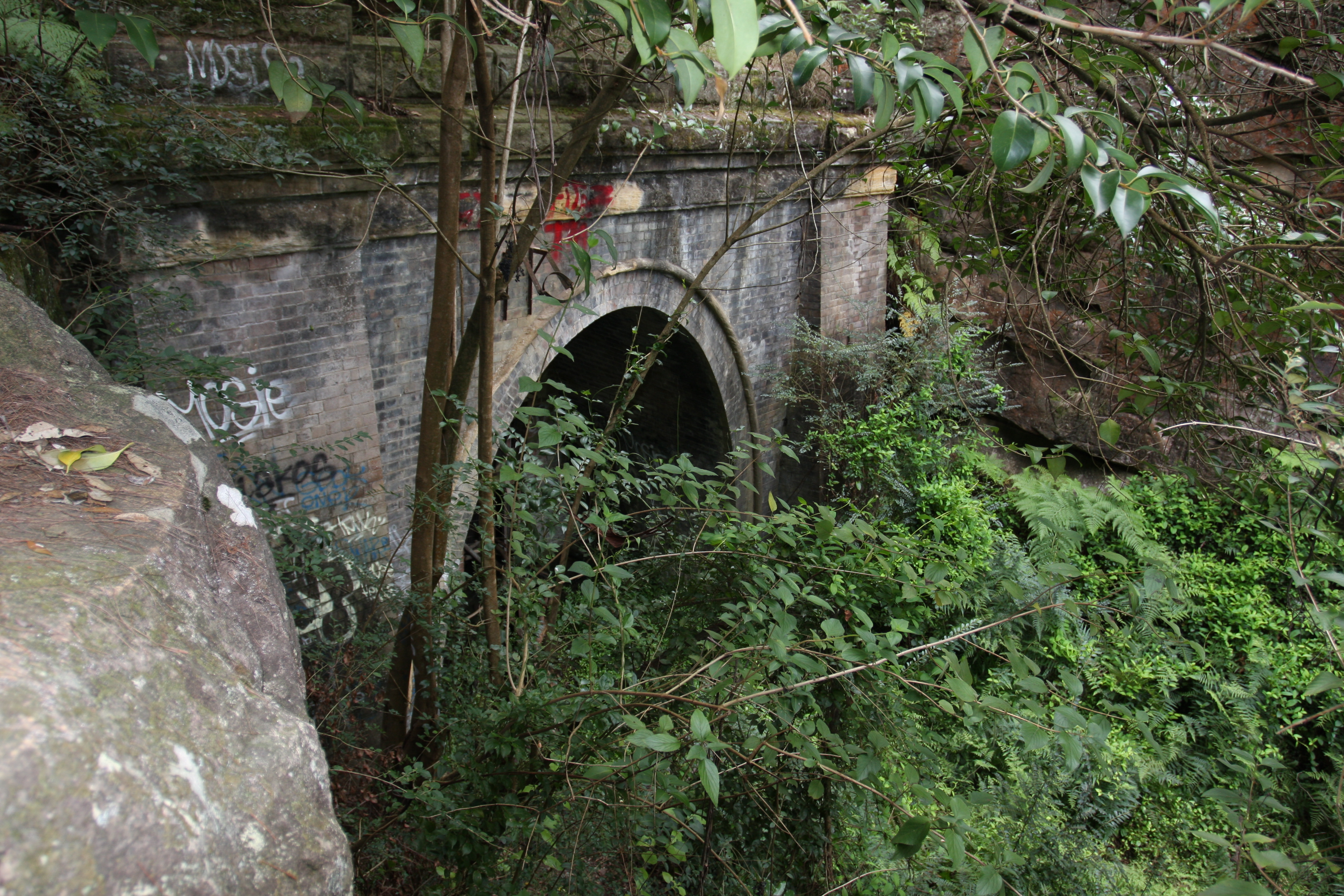 Glenbroock tunnel,former mustard gas storage unit